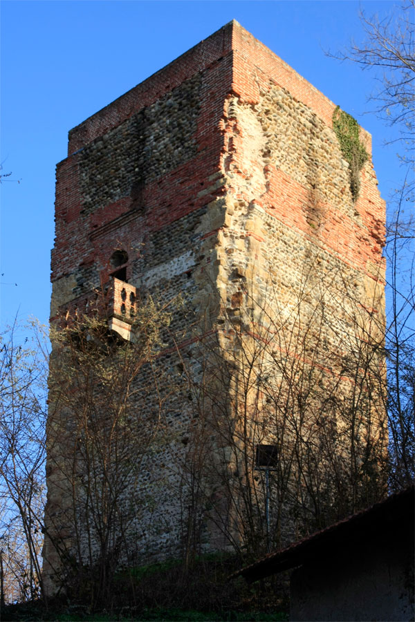 Torre medioevale di Prato Sesia